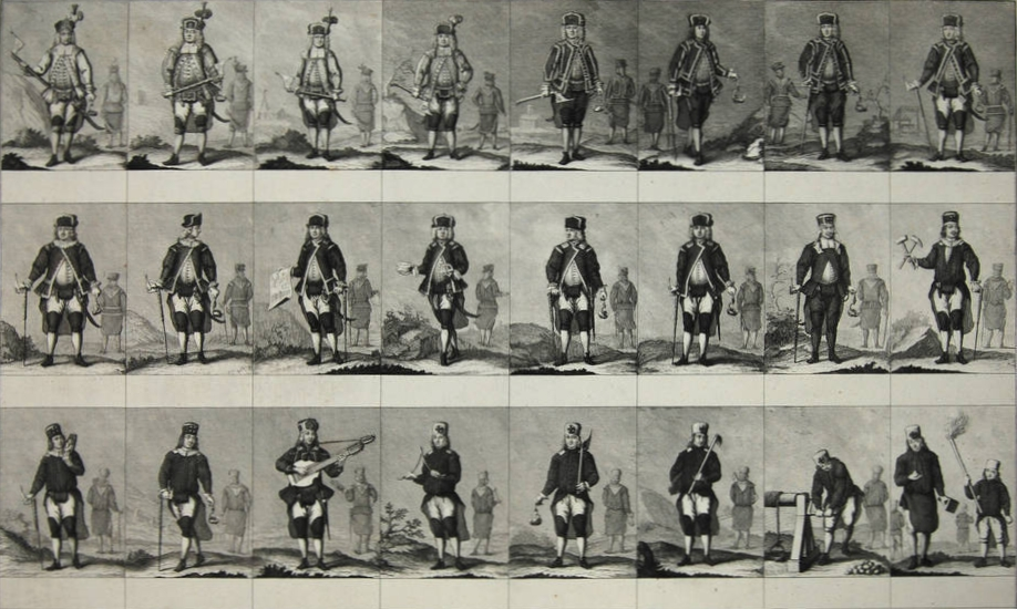 Bergmännische Paradekleidung. Zum Saturnusfest 1719 eingeführt war sie in Sachsen bis 1768 vorgeschrieben.